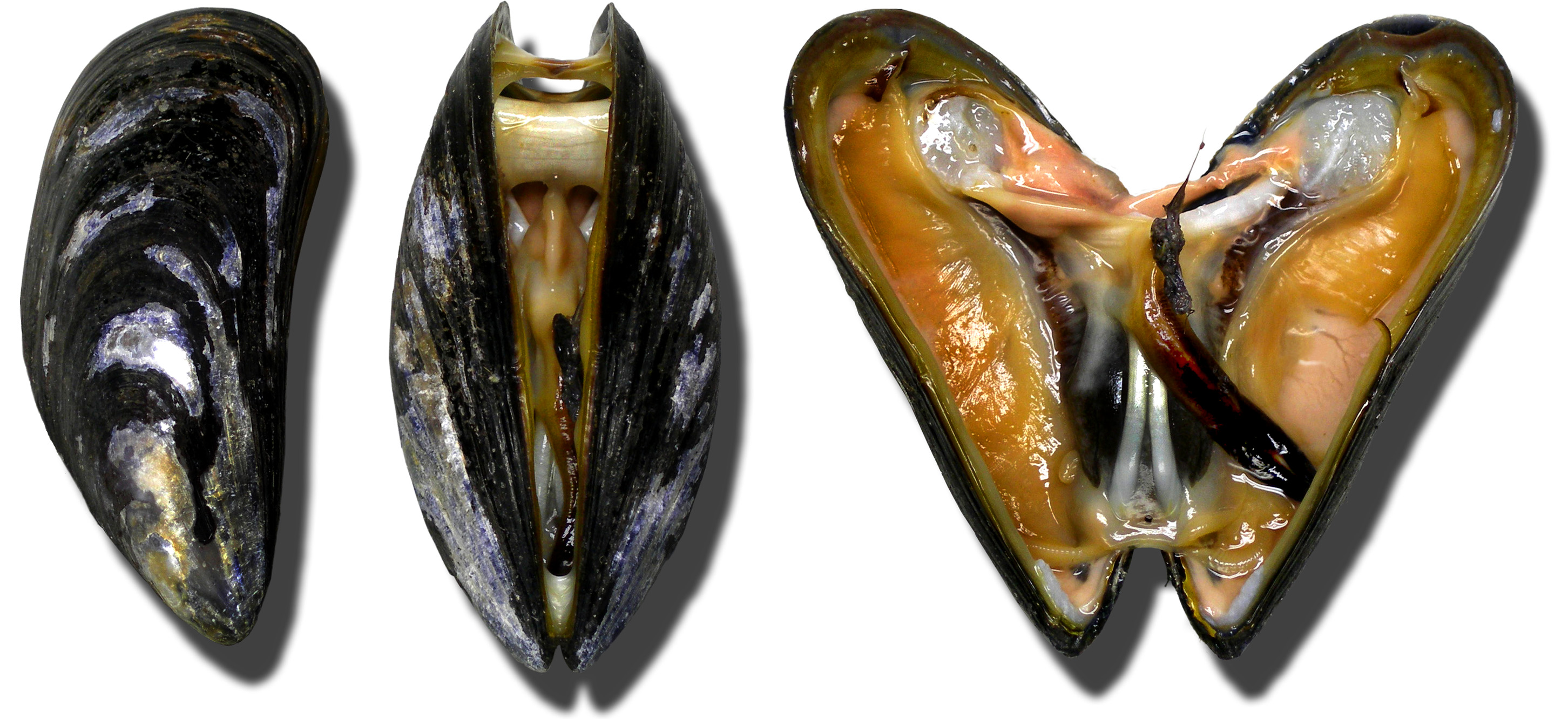 moules (mussel, Miesmuscheln), anatomies, coquilles (shell)